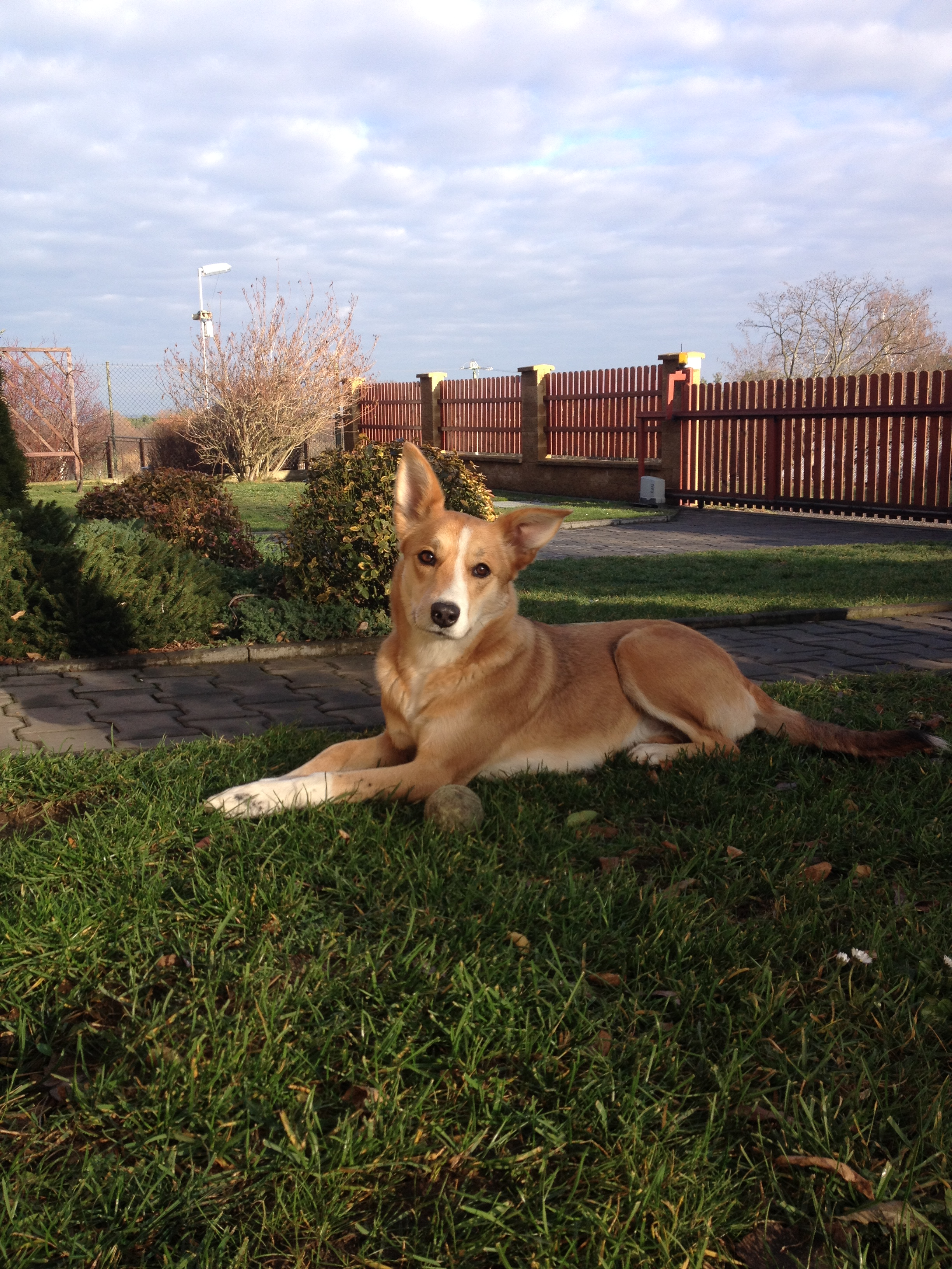 Karolínský Pes